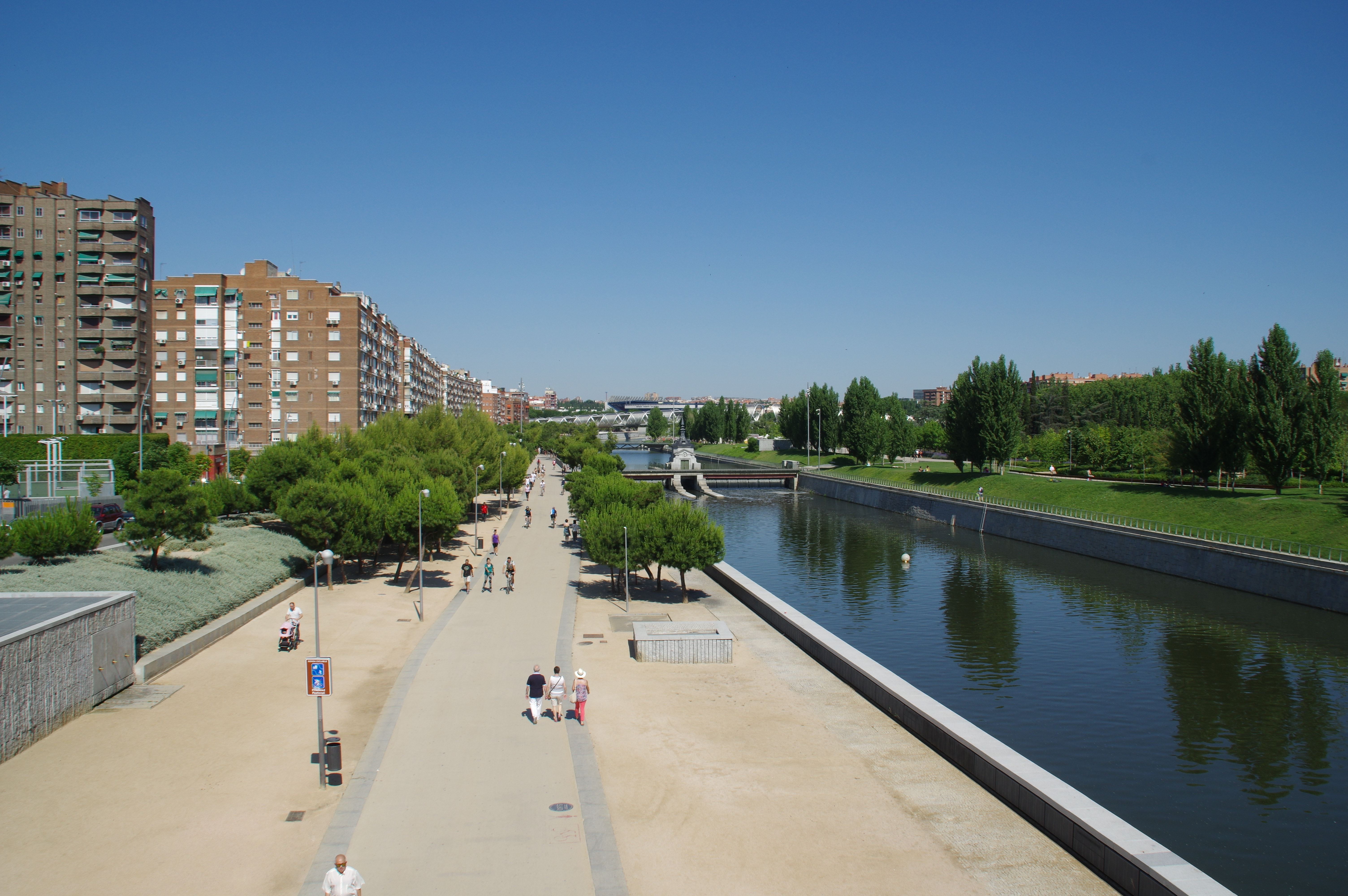 MADRID ARGANZUELA_PARQUE MADRID RÍO SOLSTICIO 2015 VIEW Ð 6K